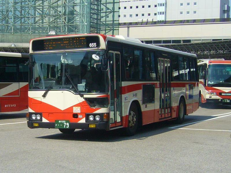 登録番号 金沢200か・・79 ほくてつバス所属 2007年4月7日 金沢駅前にて撮影